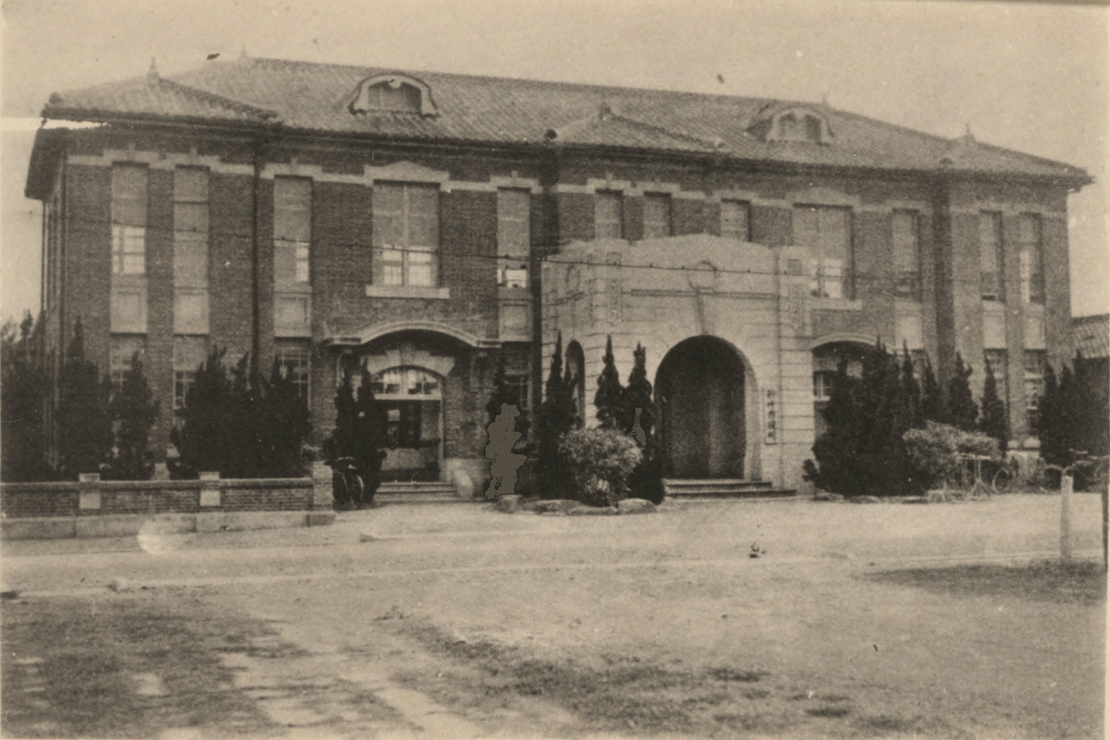 1931年新竹市役所